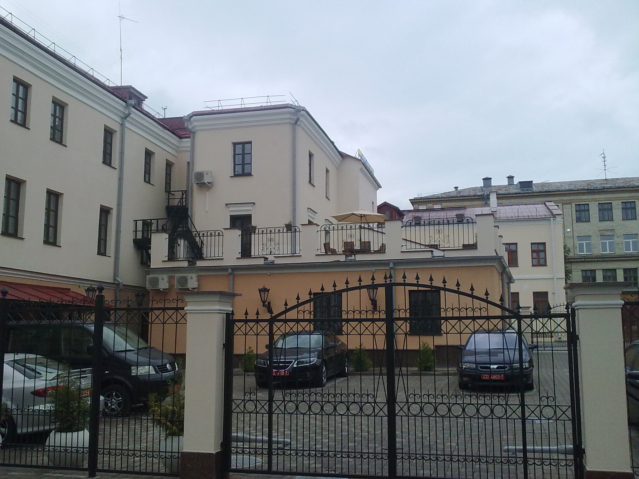 Мінск. вуліца Рэвалюцыйная. 2012